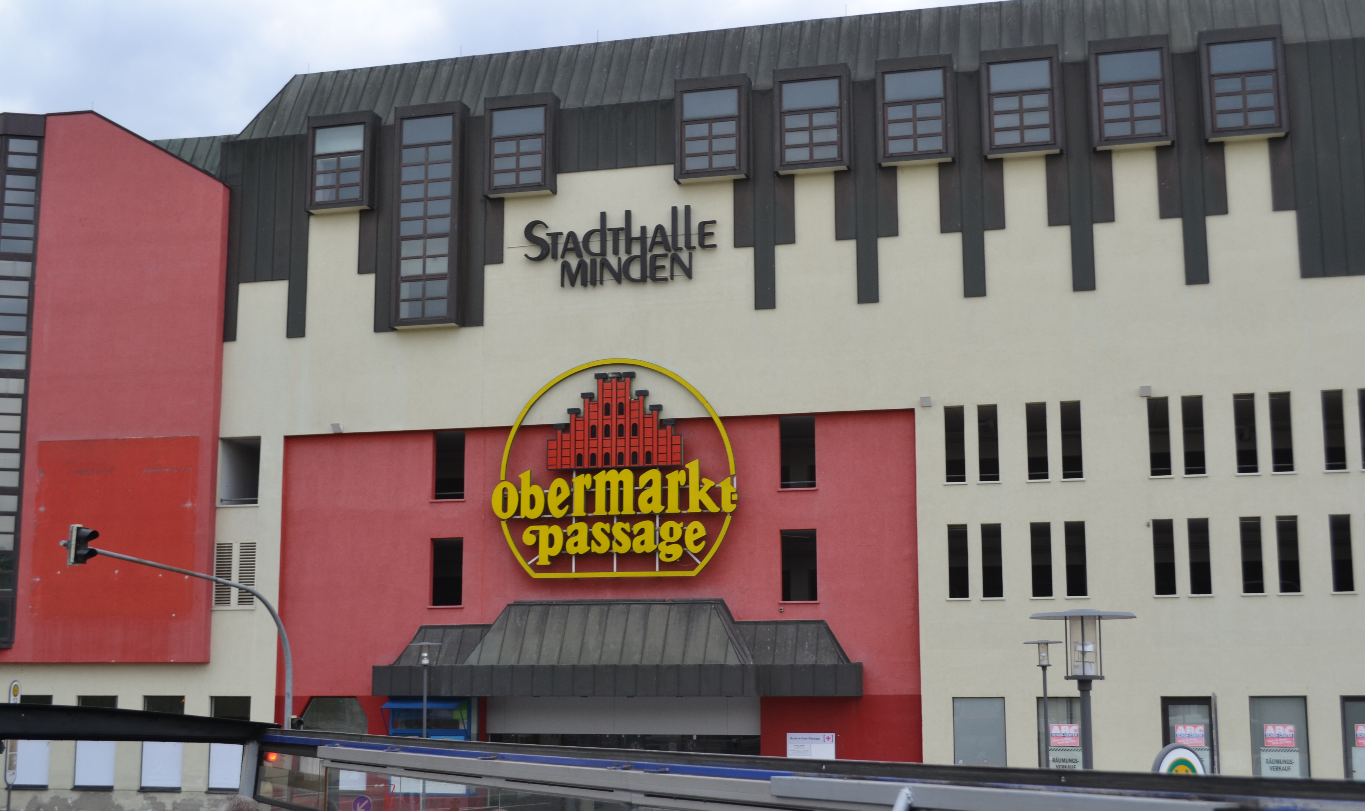 Die Obermarktpassage vom ZOB aus.